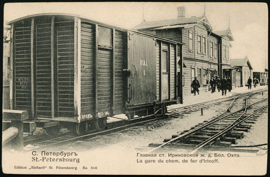 Охтенский вокзал